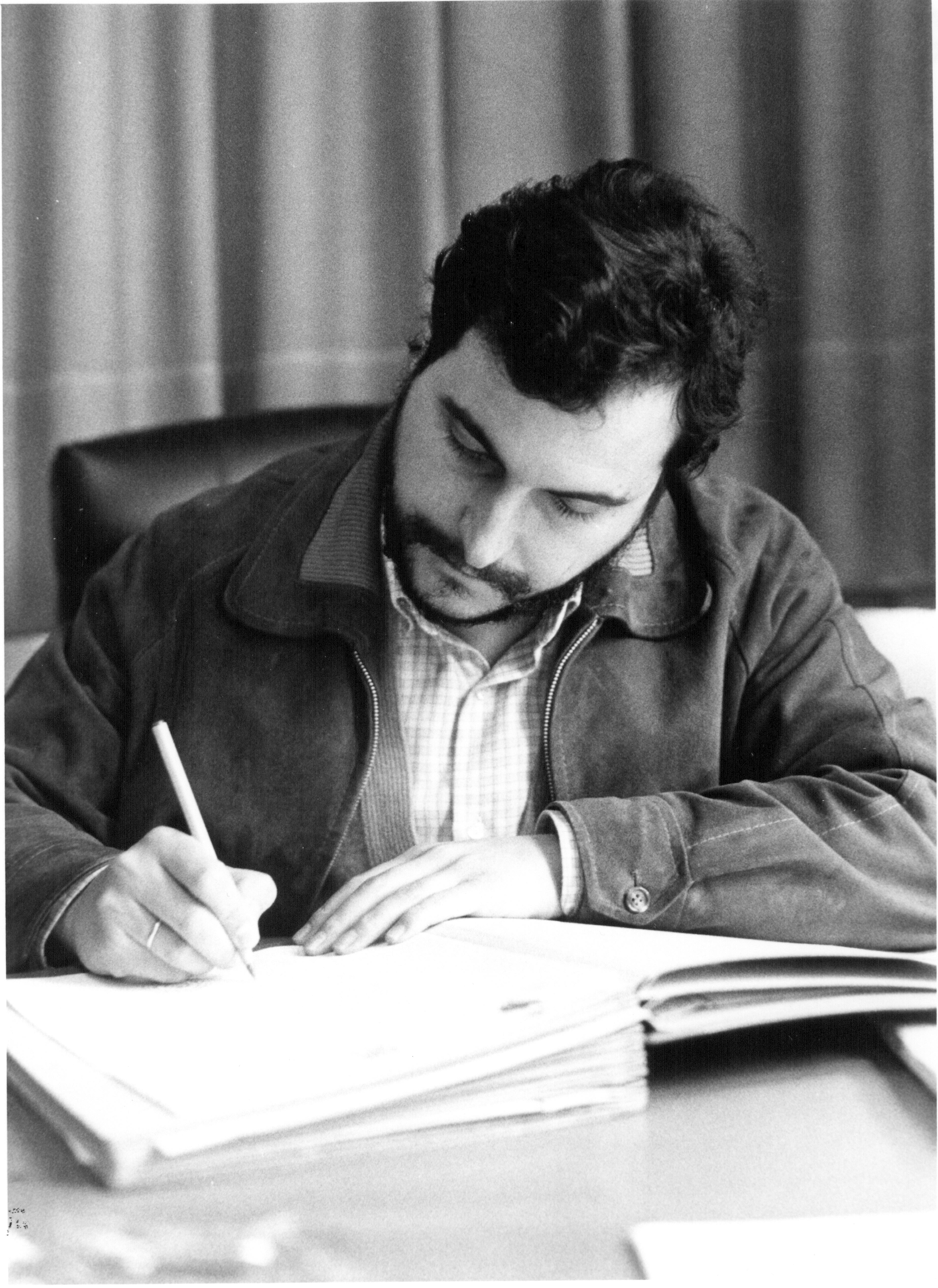 Javier Torrealdea EHUko informatika Fakultateko dekanoa 1985etik 1992ra